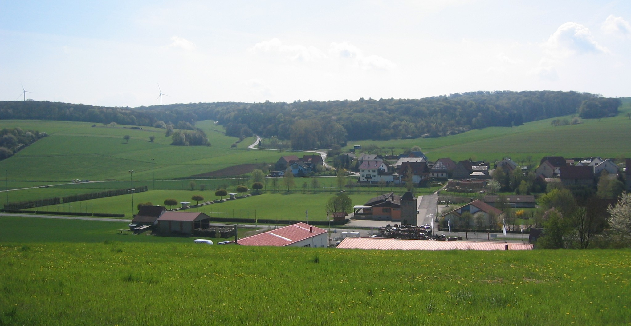 Schwebenried (Bayern/Unterfranken) aus nordwestlicher Richtung)